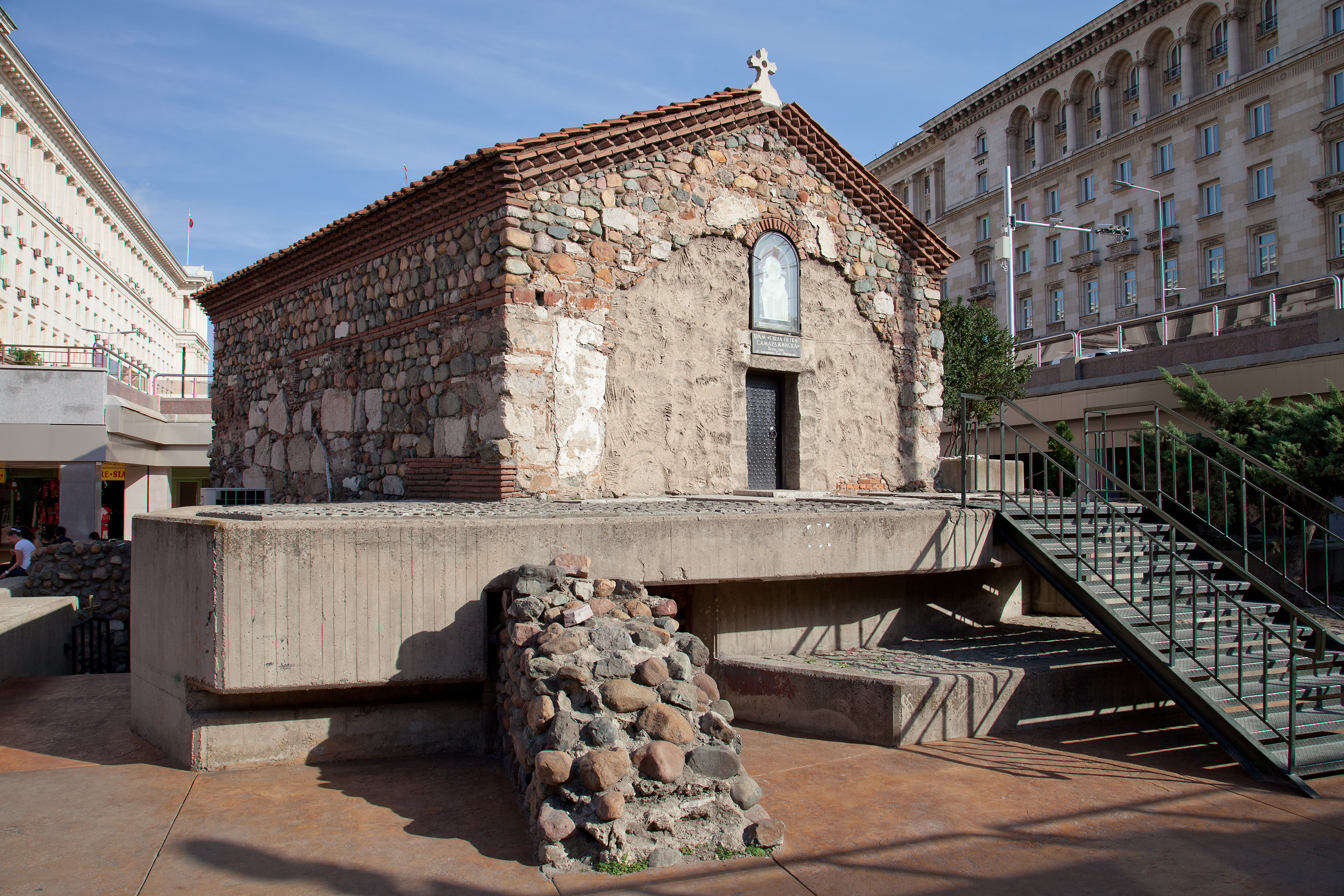 Sofia ; Stadtzentrum: Kirche Sweta Petka (Sveta Petka; Saint Petka; St Petka; heilige Petka)